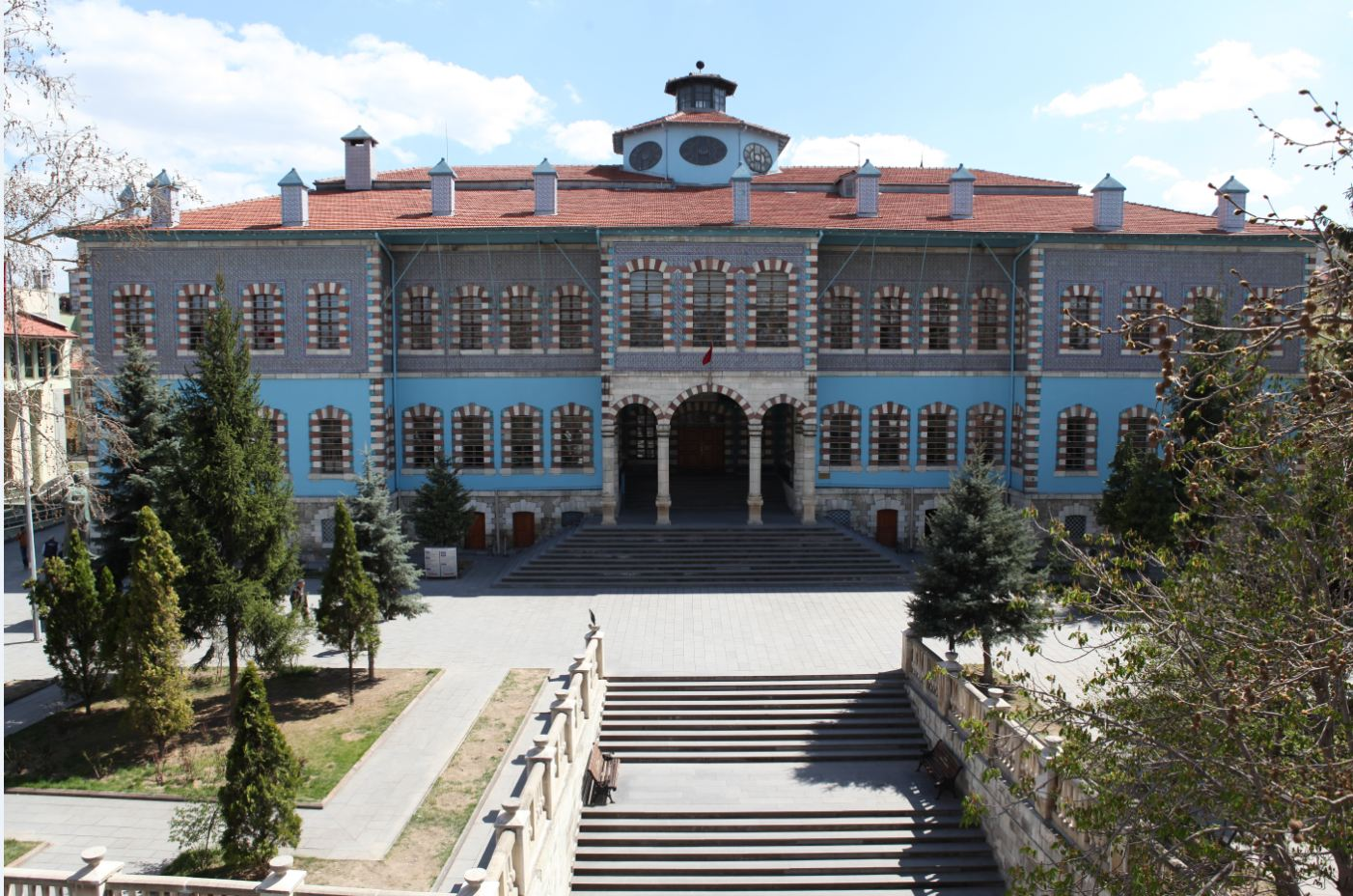 Eski Hükümet Konağı, Kütahya.